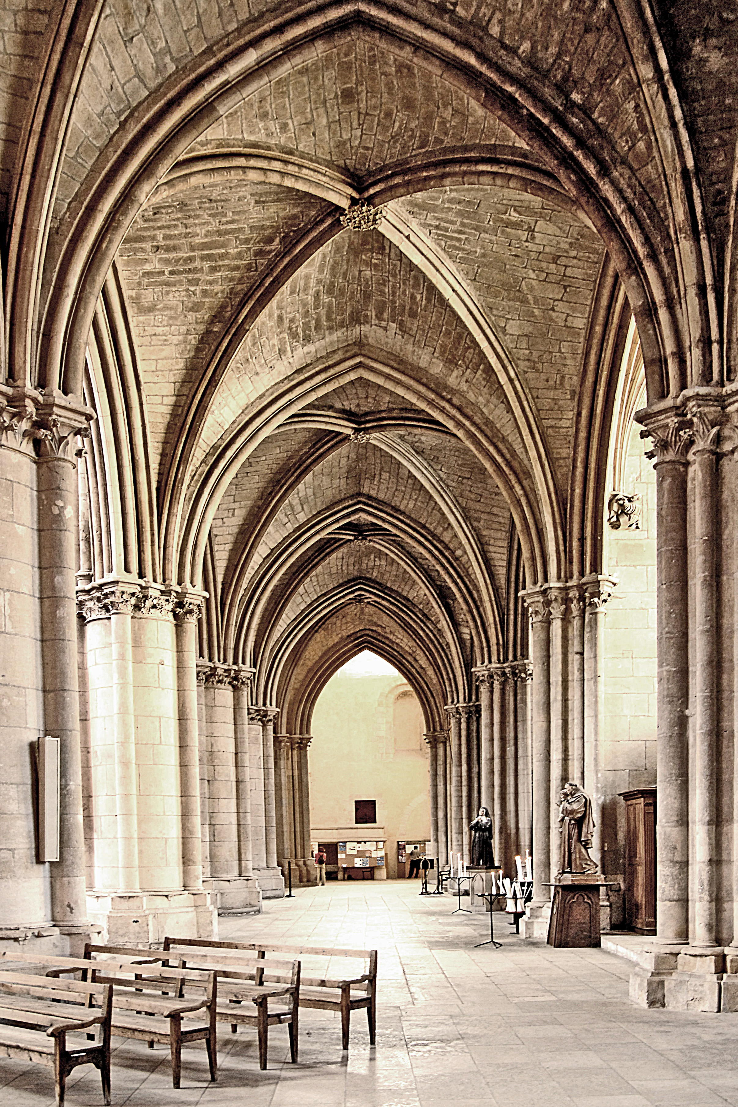 Kathedrale Nevers, nördl. Seitenschiff nach hinten